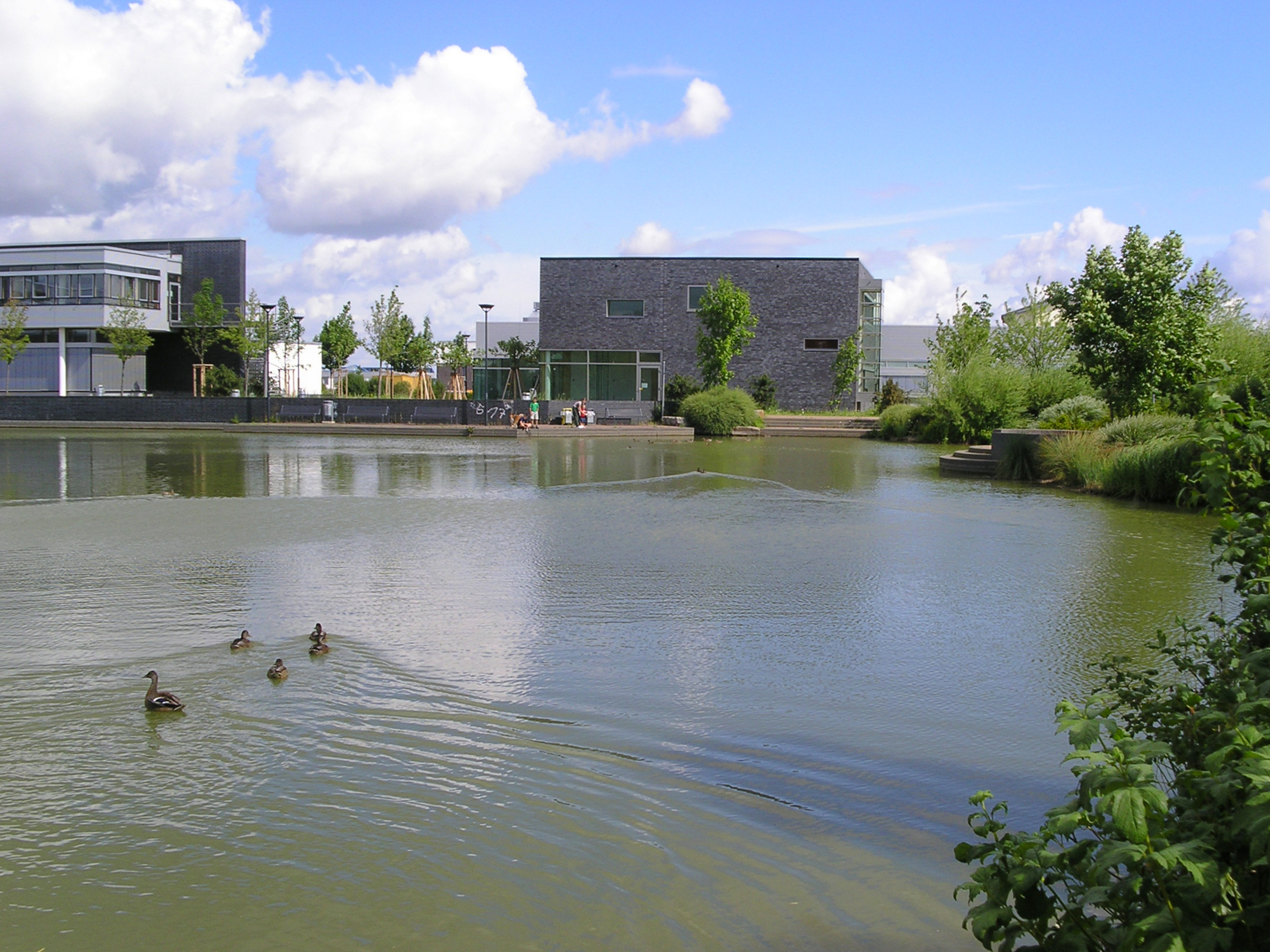 Bürogebäude des BusinessCampus auf dem Gelände der FH Bonn-Rhein-Sieg in Rheinbach.